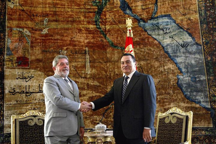 Cairo (Egito) - Lula e Mubarak se cumprimentam durante encontro no Palácio Heliópolis. (Foto Ricardo Stuckert/PR - hor - 10)